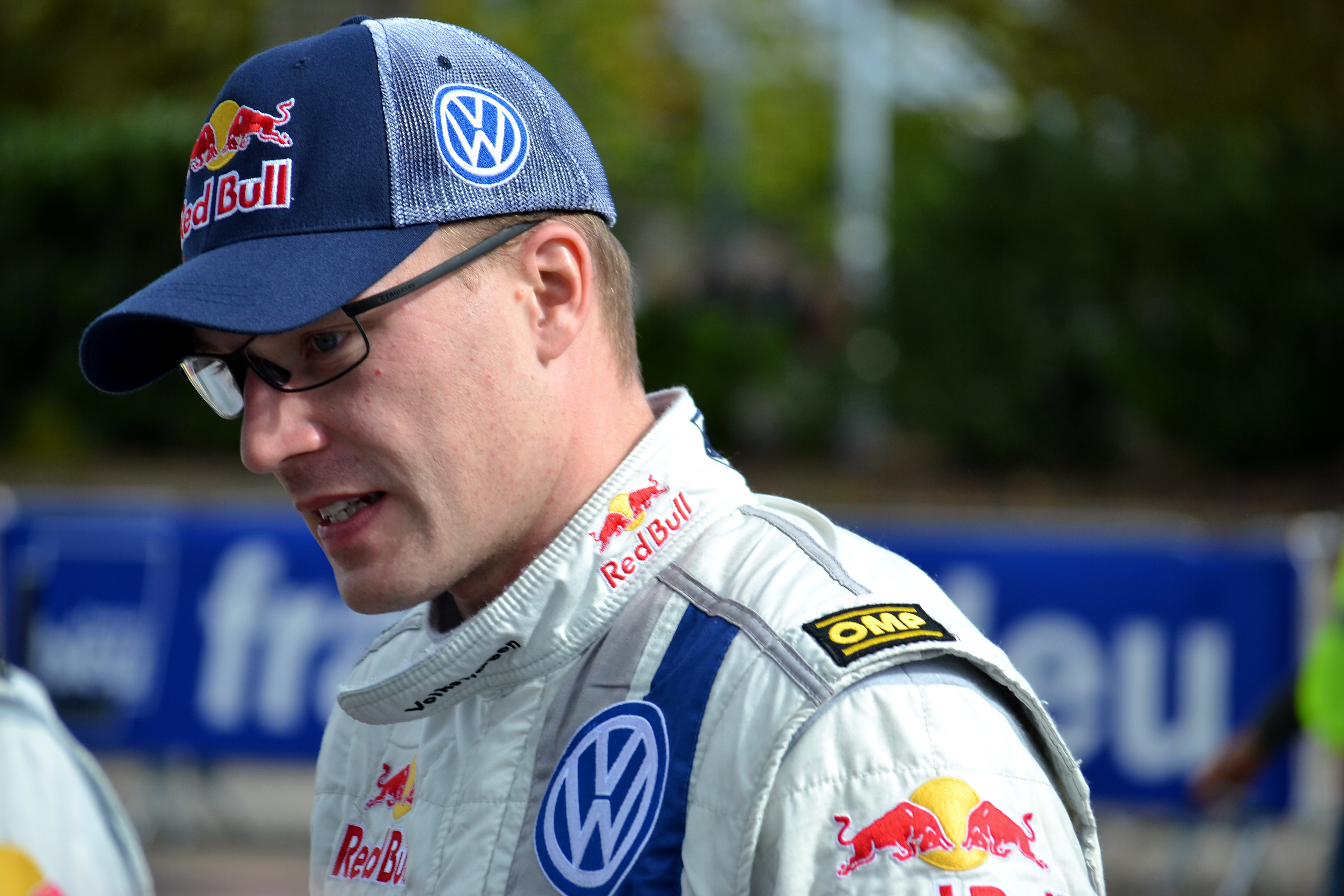 Jari-Matti Latvala au parc d'assistance de Colmar durant le Rallye de France-Alsace 2013.